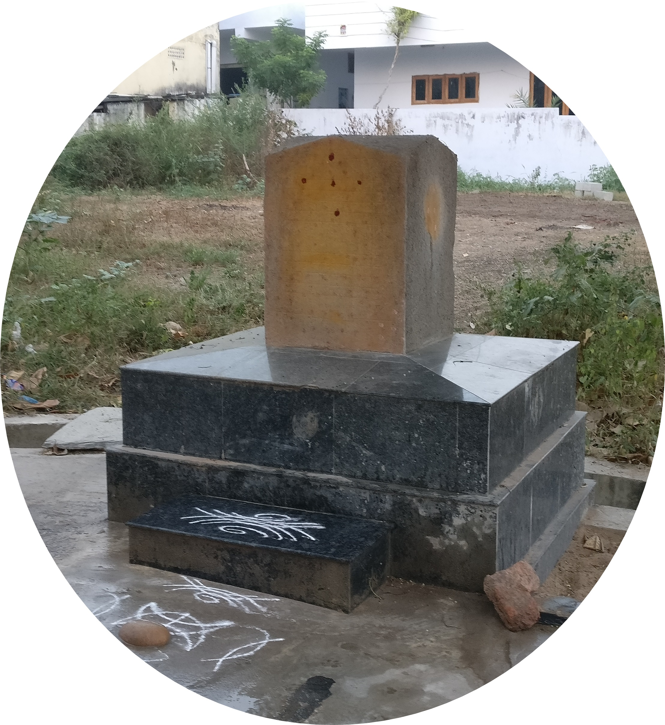 గ్రామ మద్యమున నెలకొల్పిన శిల. గ్రామ నడిబొడ్డున అరుగువలే అమర్చిన పెద్దబండ. గ్రామ నడిబొడ్డున అరుగువలే అమర్చిన పెద్దబండనే బొడ్రాయిగా రూపాంతరము చెంది, ఈ గ్రామములో బొడ్రాయిగా లేదా బొడ్డురాయి లేదా నాభిశిలగా పిలిచెదరు.